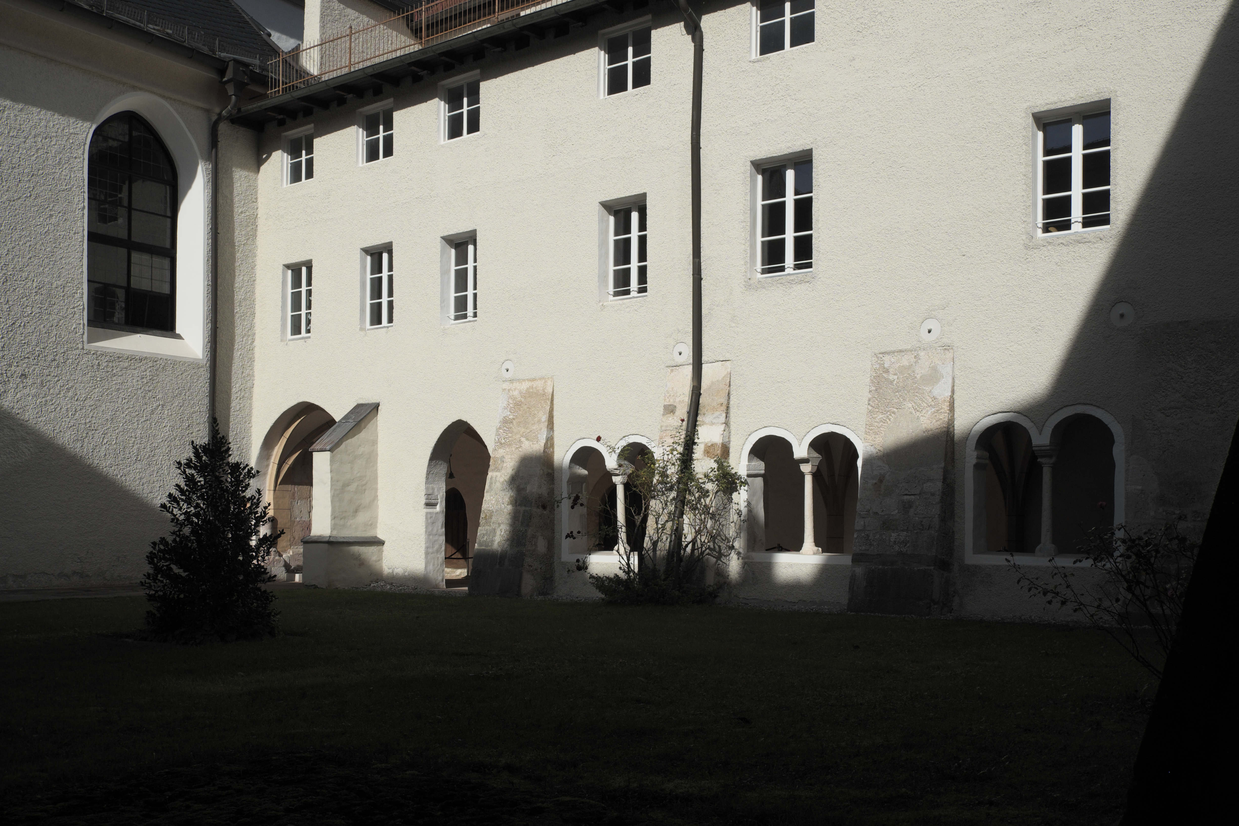 Kloster St. Zeno in Bad Reichenhall im Landkreis Berchtesgadener Land (Bayern/Deutschland), Kreuzgang